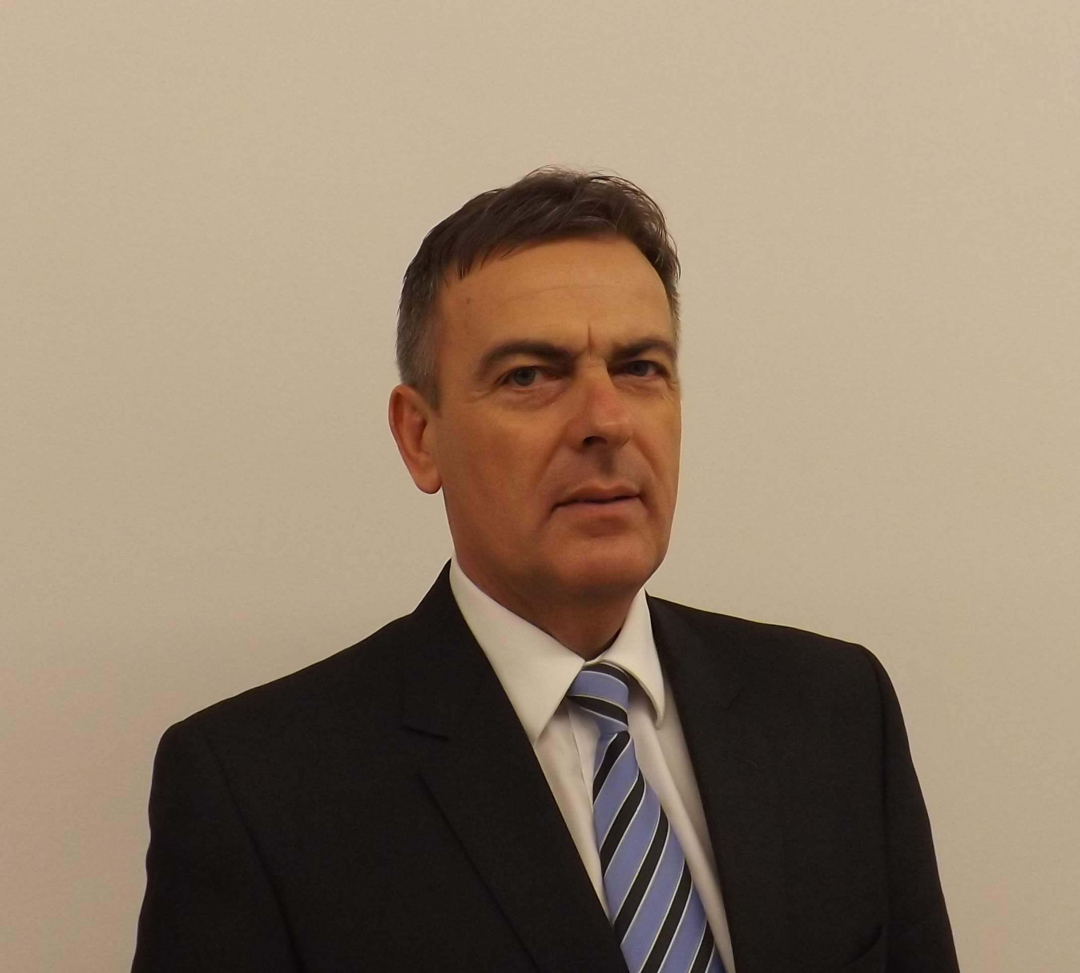 Zbigniew Matuszczak, poseł SLD